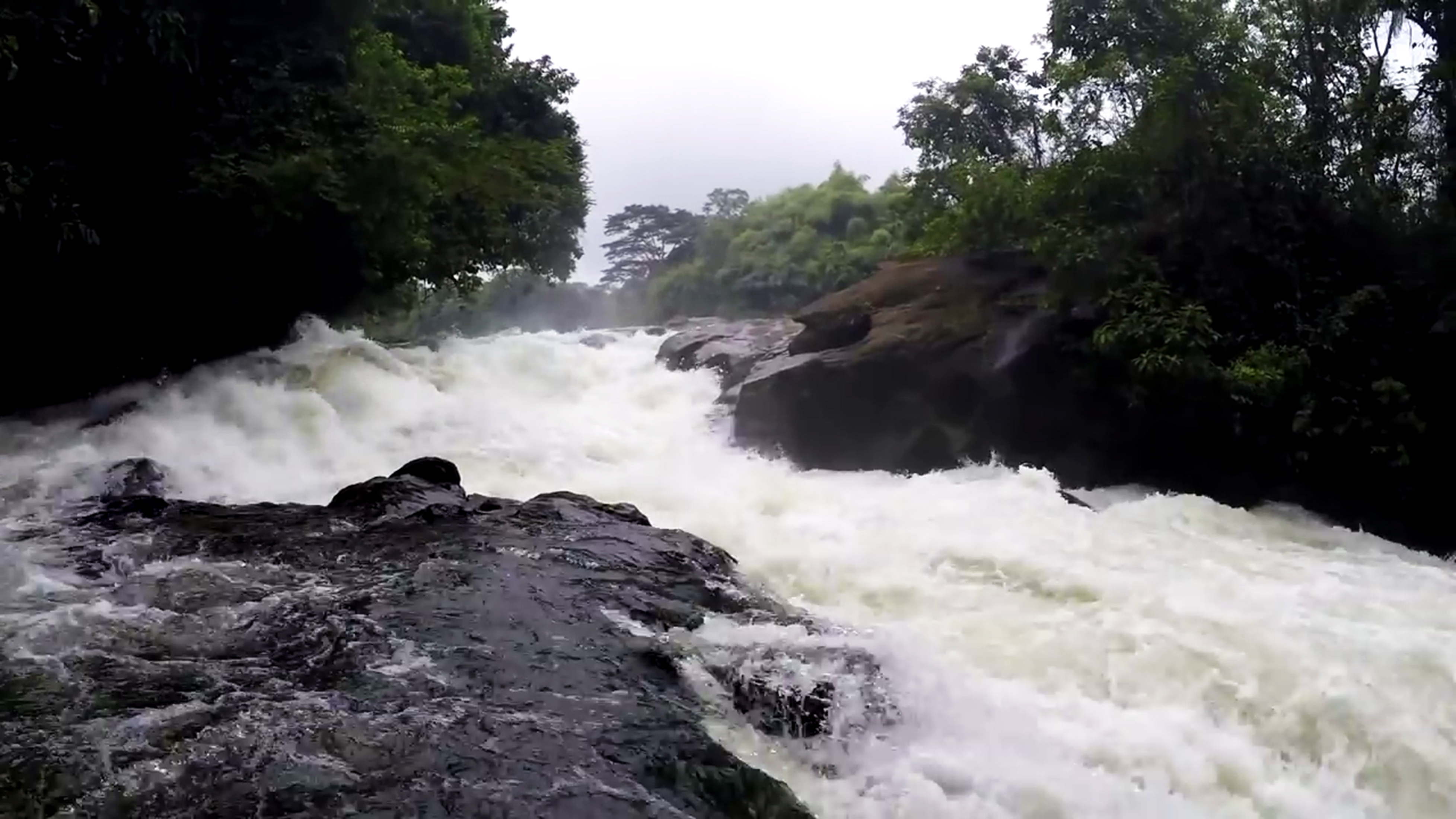 Le parc national de Korup est situé au Sud-Ouest du pays, à la frontière avec le Nigeria.